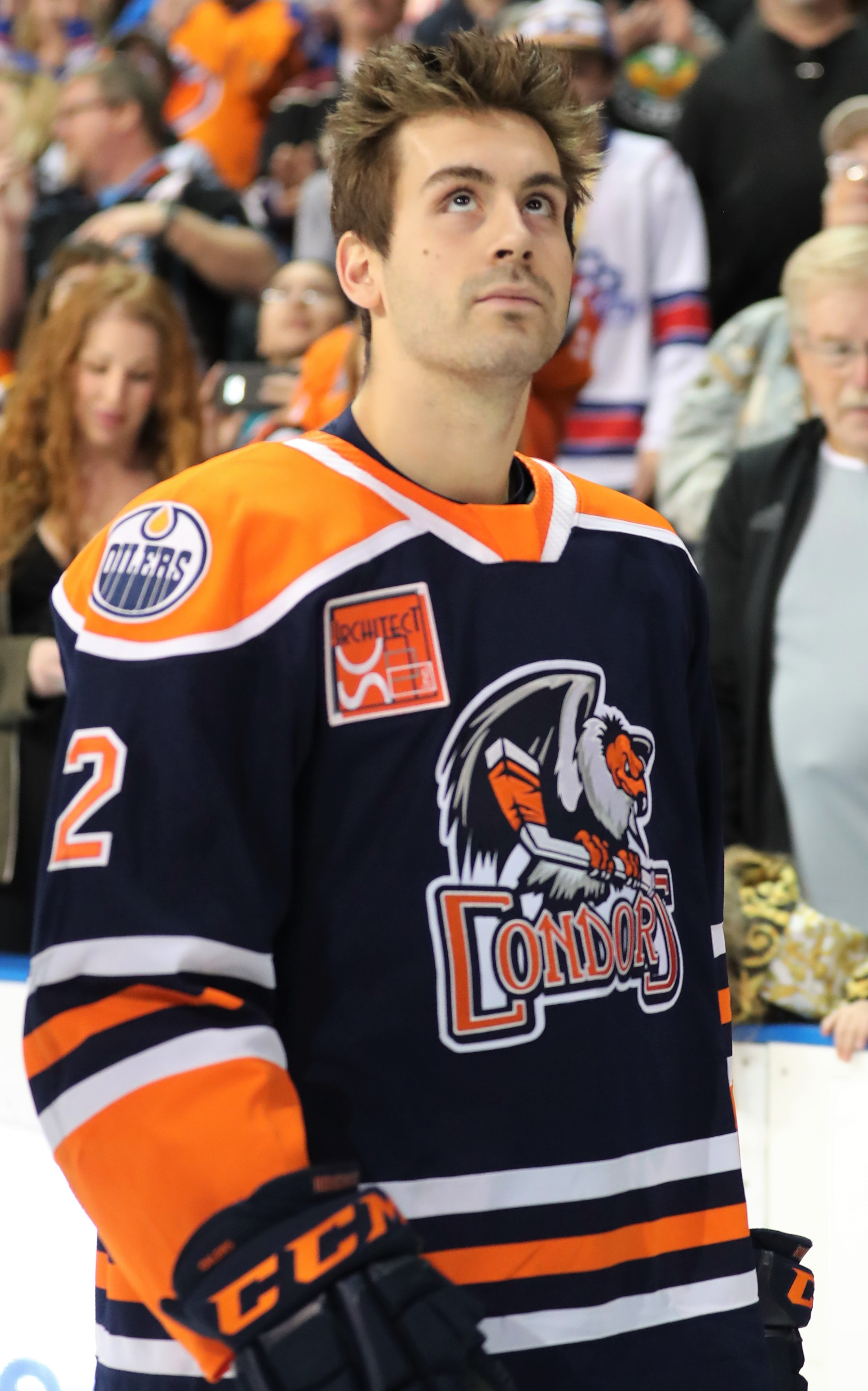 AA3I0835